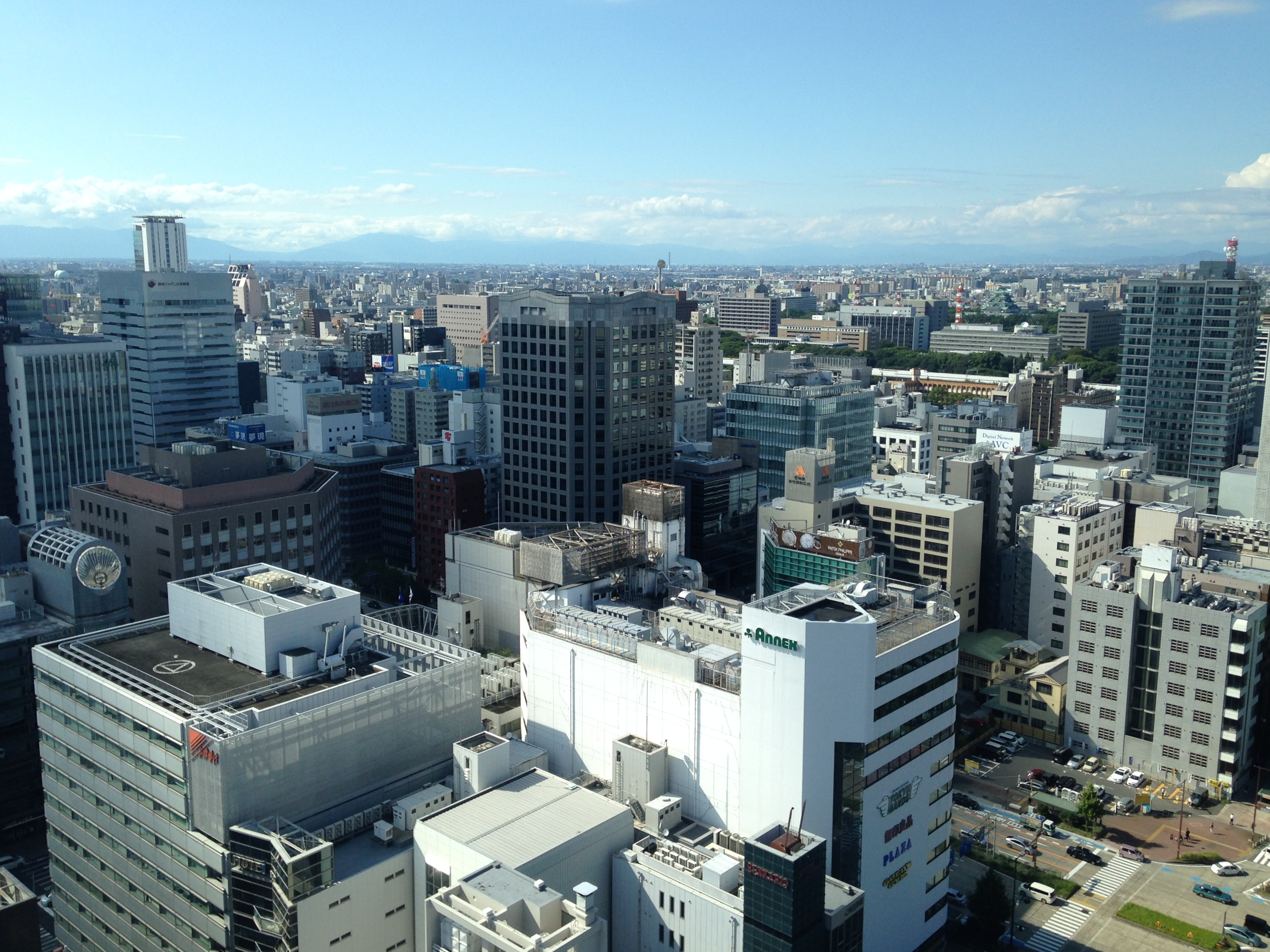 名古屋テレビ塔より眺める名古屋市(北西側)